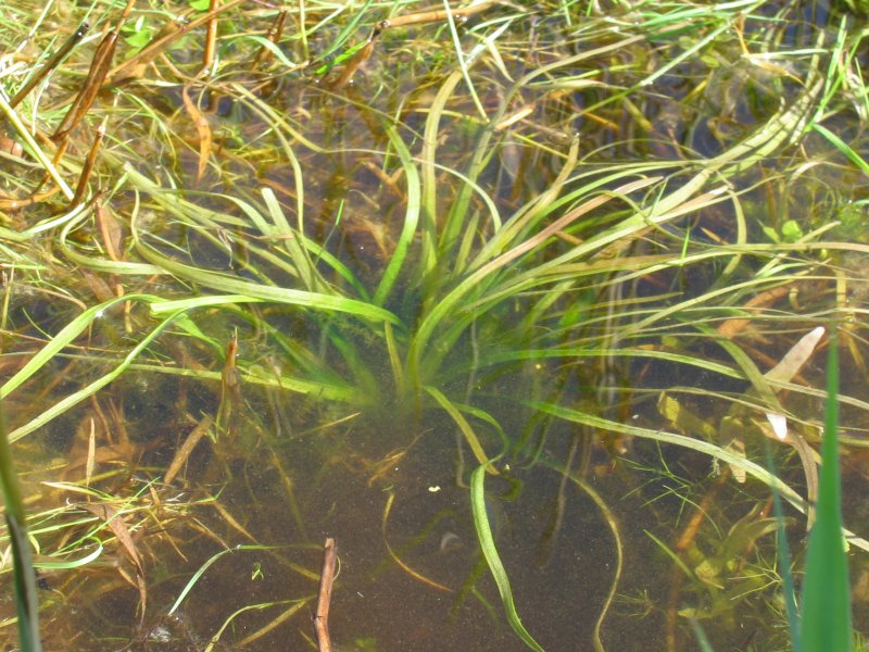 Igelschlauch (Baldellia ranunculoides)